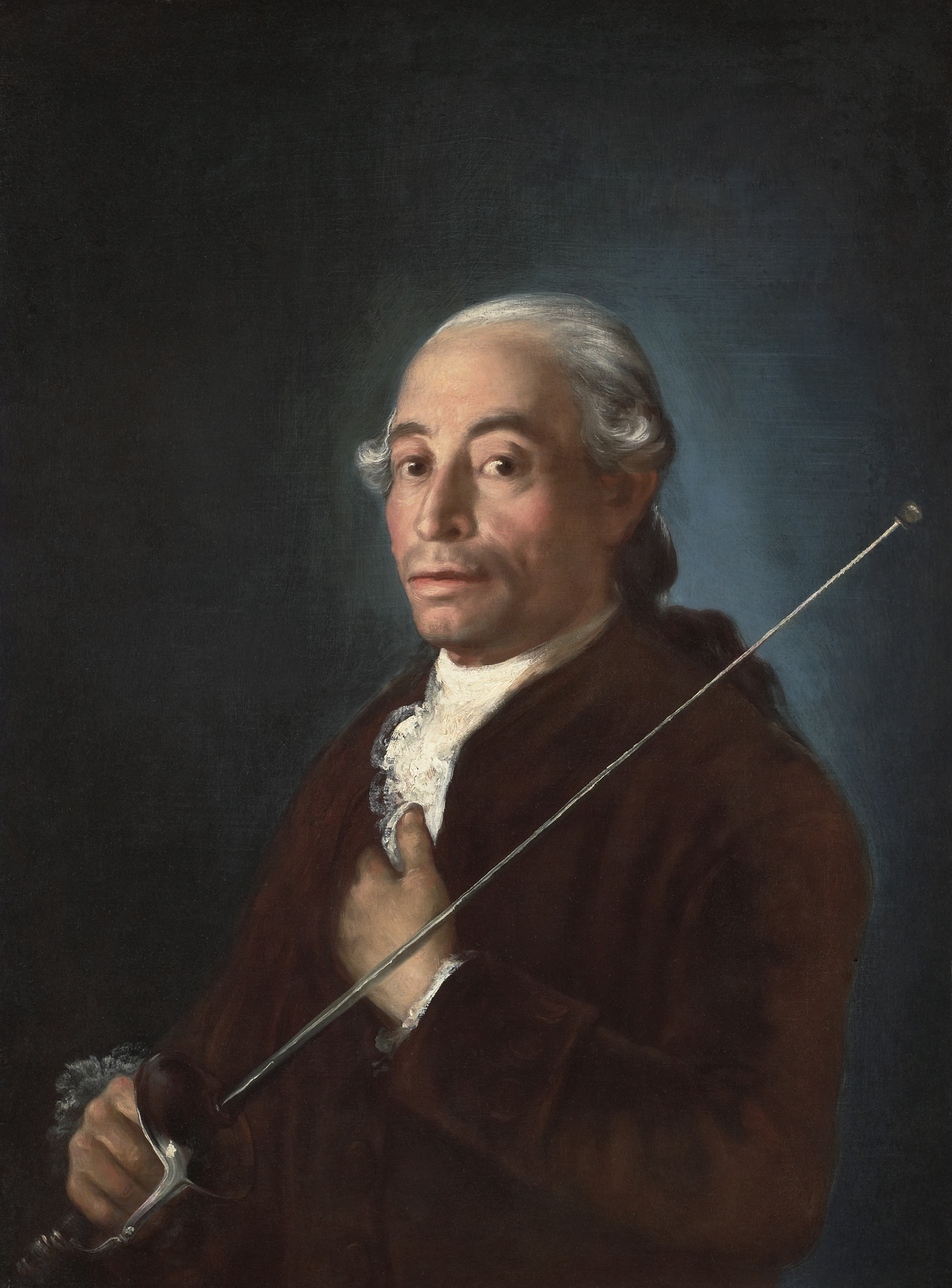 Francesco Sabatini o Hombre con un sable de esgrima o Retrato de hombre con florete